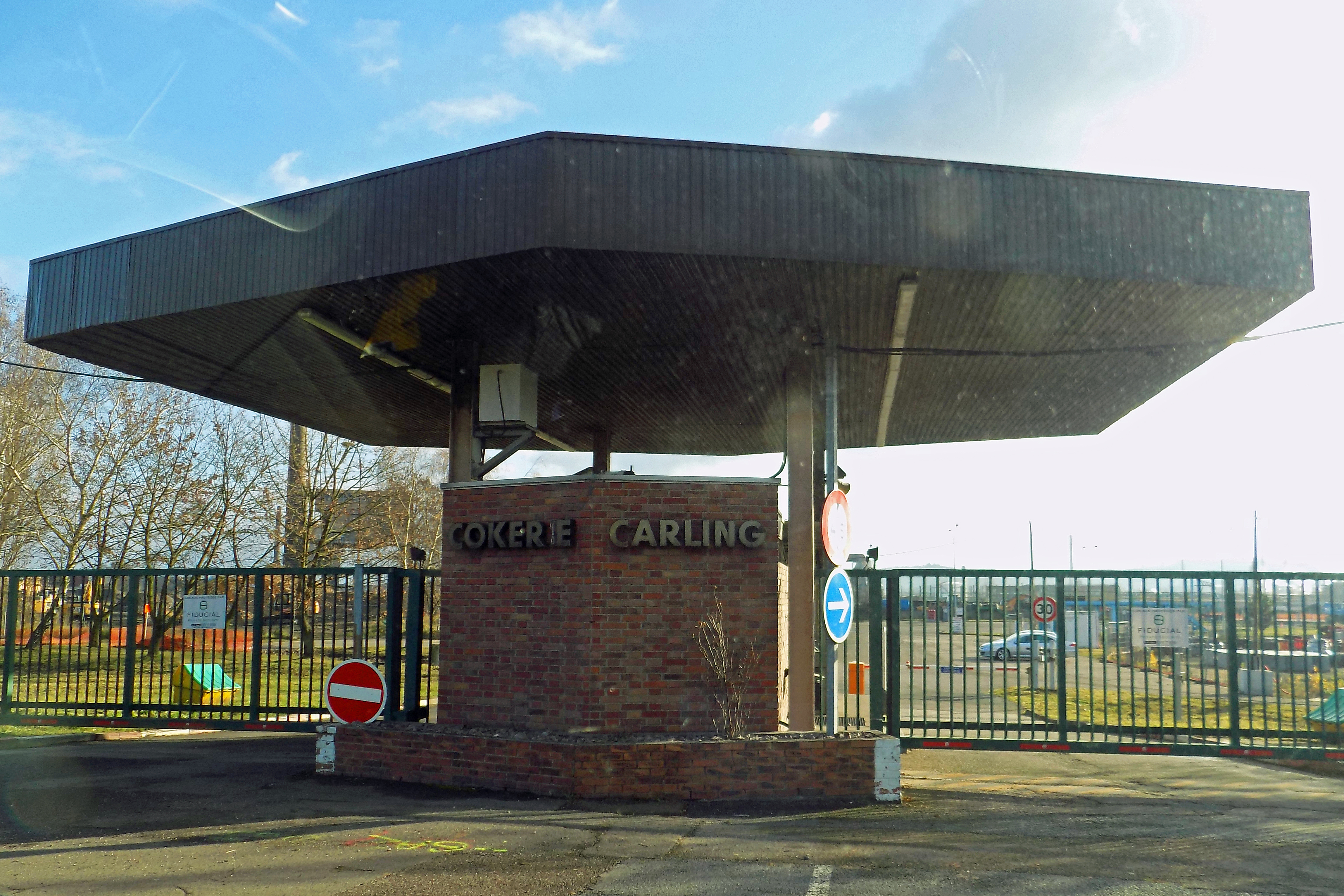 Entrée de l'ancienne cokerie de L'Hôpital-Carling (décembre 2014)